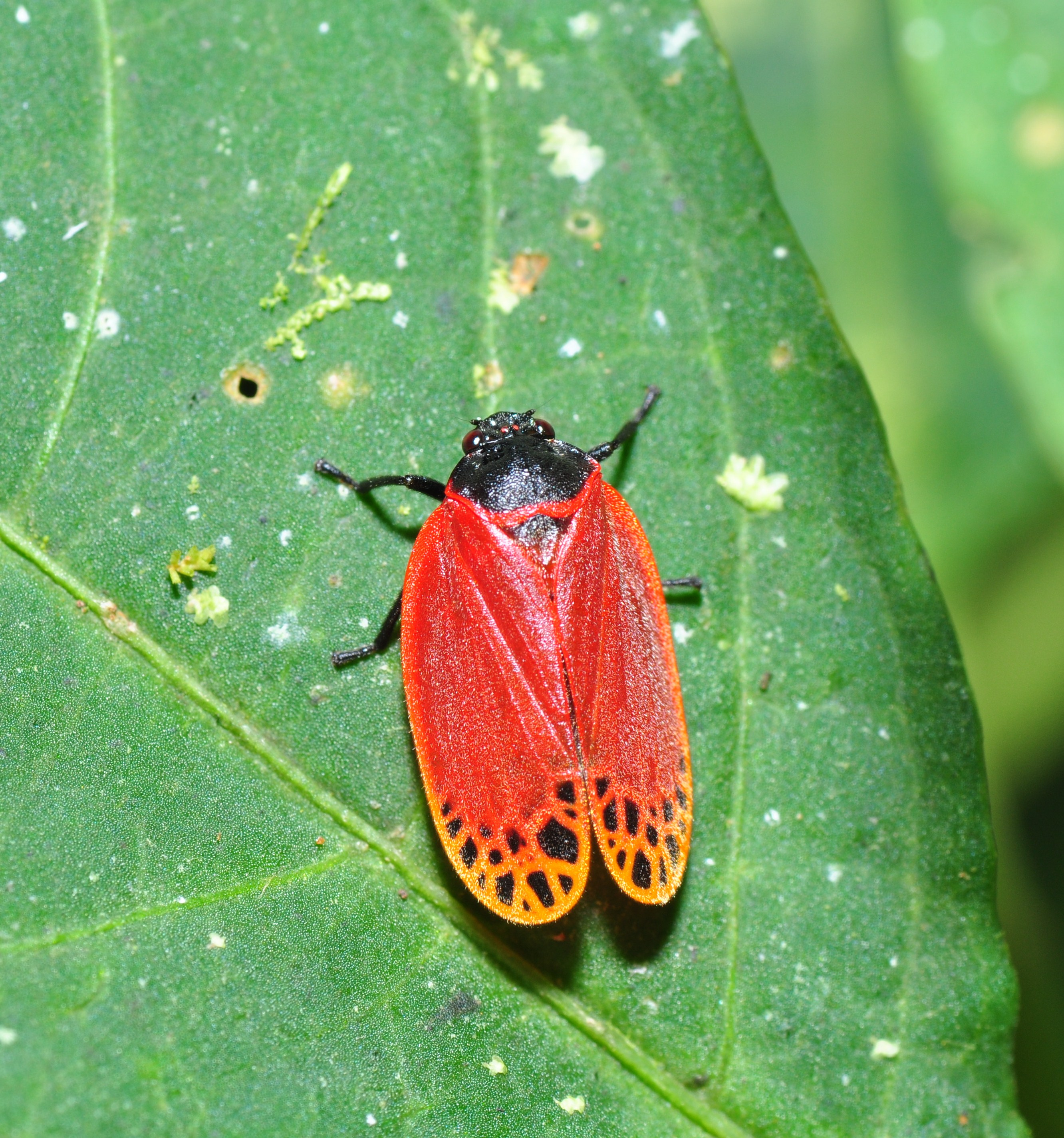 Leafhopper (Cercopidae)